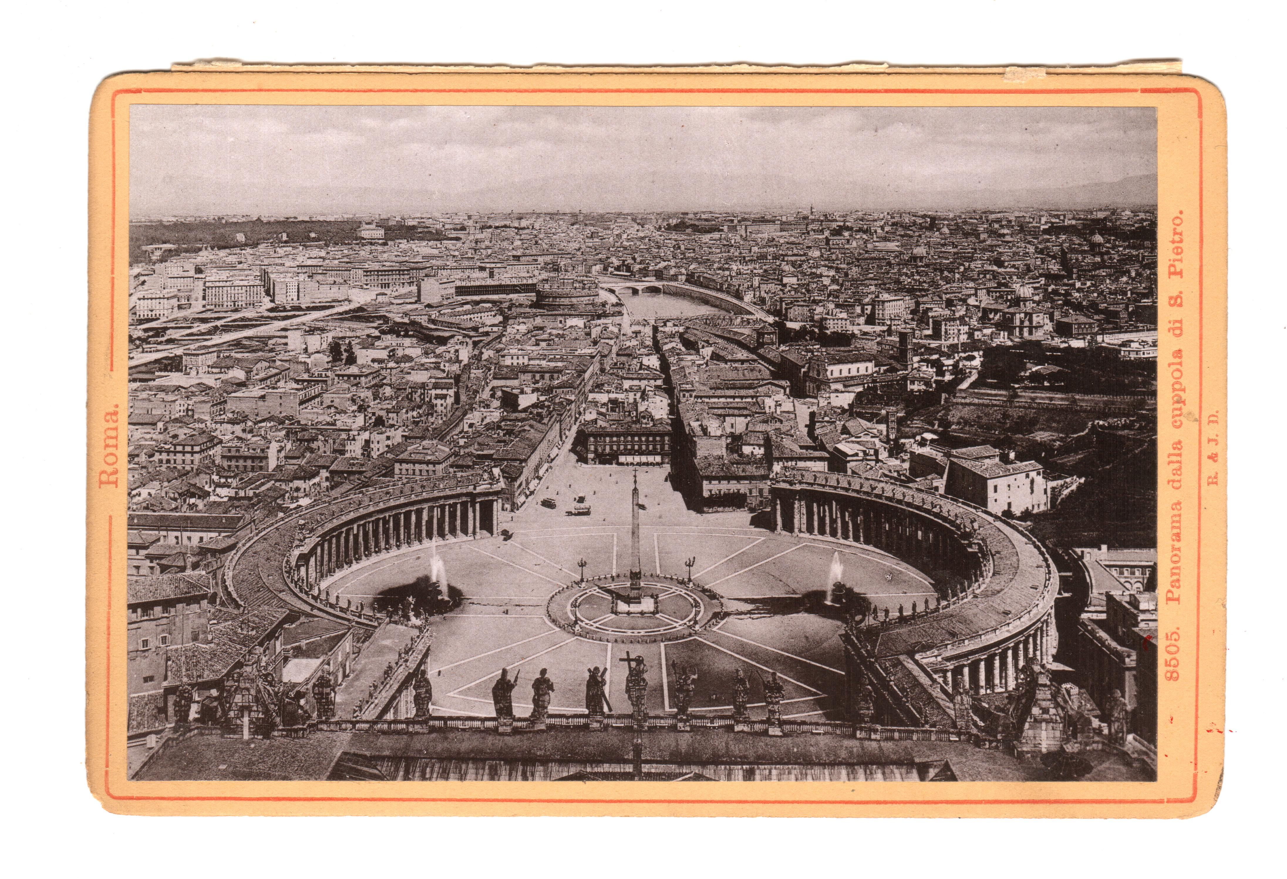 Italia, Róma. Fényképalbum 12 képéből. A képek fehér kartonpapíron, leporellóvá kötve papírcsíkokkal. A fényképek mérete: 15 cm x 9,8 cm. A fényképtartó album belső oldalán: LIBRERIA LOESCHER ECo / DI BRETSCHNEIDER E REGENBERG / ROMA, CORSO 307 ©© Megjelent Creative Commons alatt a Metapolisz sorozatban. A Metapolisz sorozat valamennyi képe és filmje Creative Commons alatti valamint kereskedelmi - for profit - célra is felhasználható. Ajánlott hivatkozás: Derzsi Elekes Andor: Metapolisz DVD line ©© Published under Creative Commons in the Metapolisz DVD line. All of the photos and vids in the Metapolisz DVD line are under Creative Commons and can be used even for commercial – for profit – purposes. Recommended Citation Derzsi Elekes Andor: Metapolisz DVD line